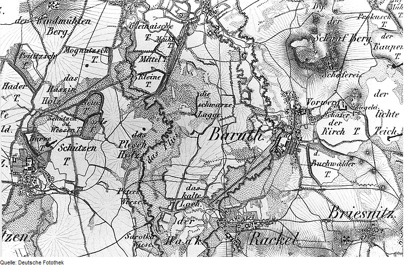 Original image description from the Deutsche Fotothek Malschwitz-Baruth. Oberreit, Sect. Bautzen, 1844/46